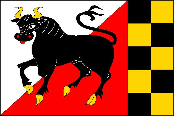 Vlajka obce Bylany (okres Chrudim)